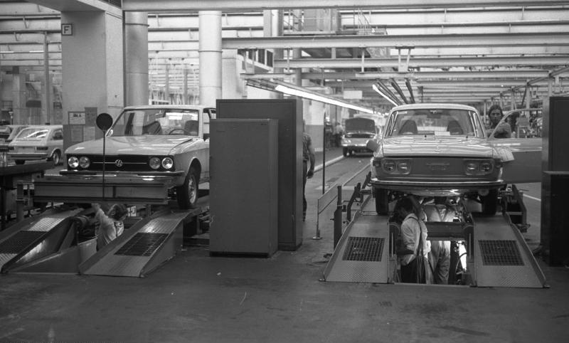 VW-Werk Salzgitter Salzgitter Endmontage 412 und K70